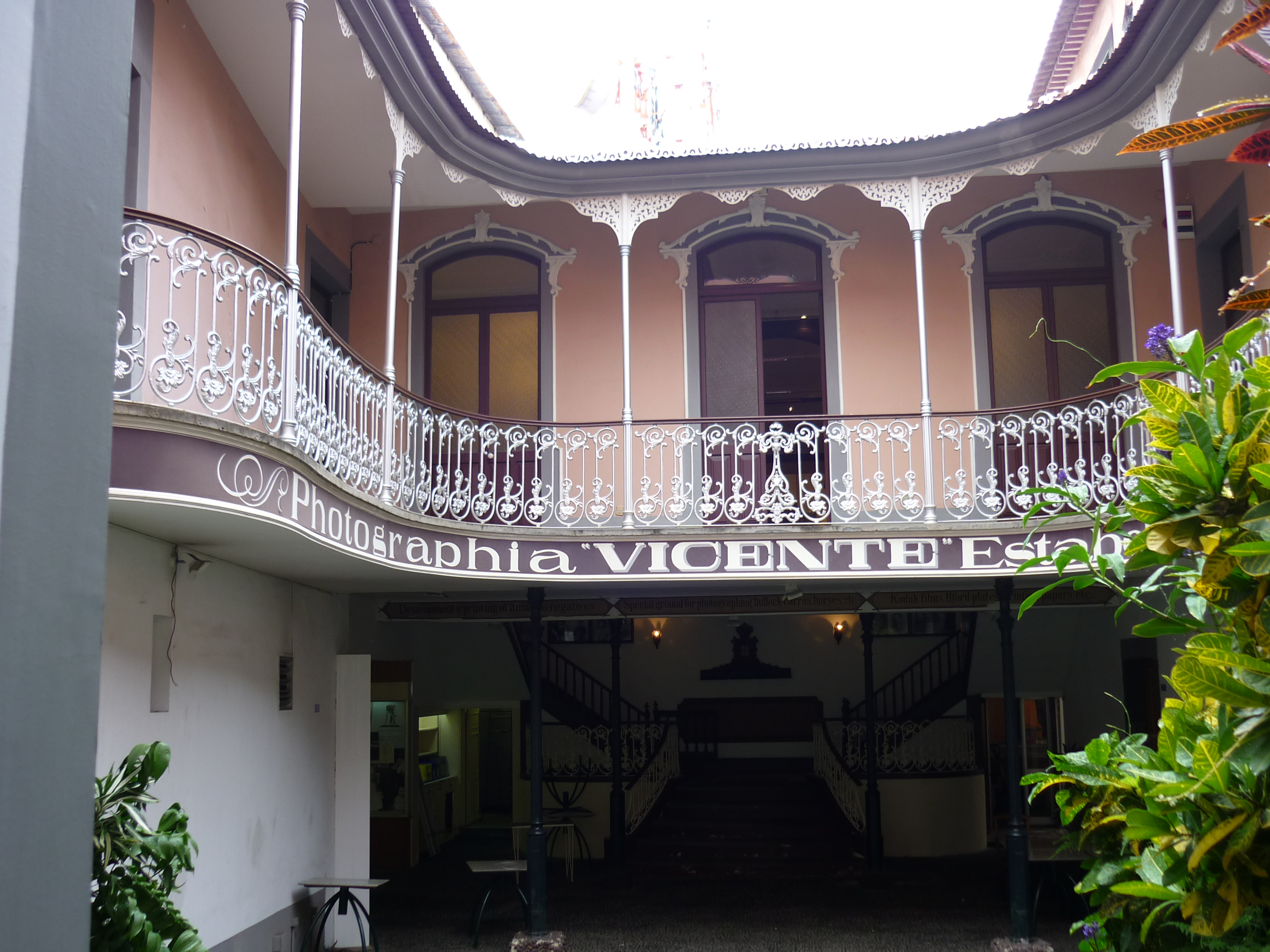 A Photografia Museu Vicentes fényképészeti múzeum belső udvara Funchalban (Madeira)